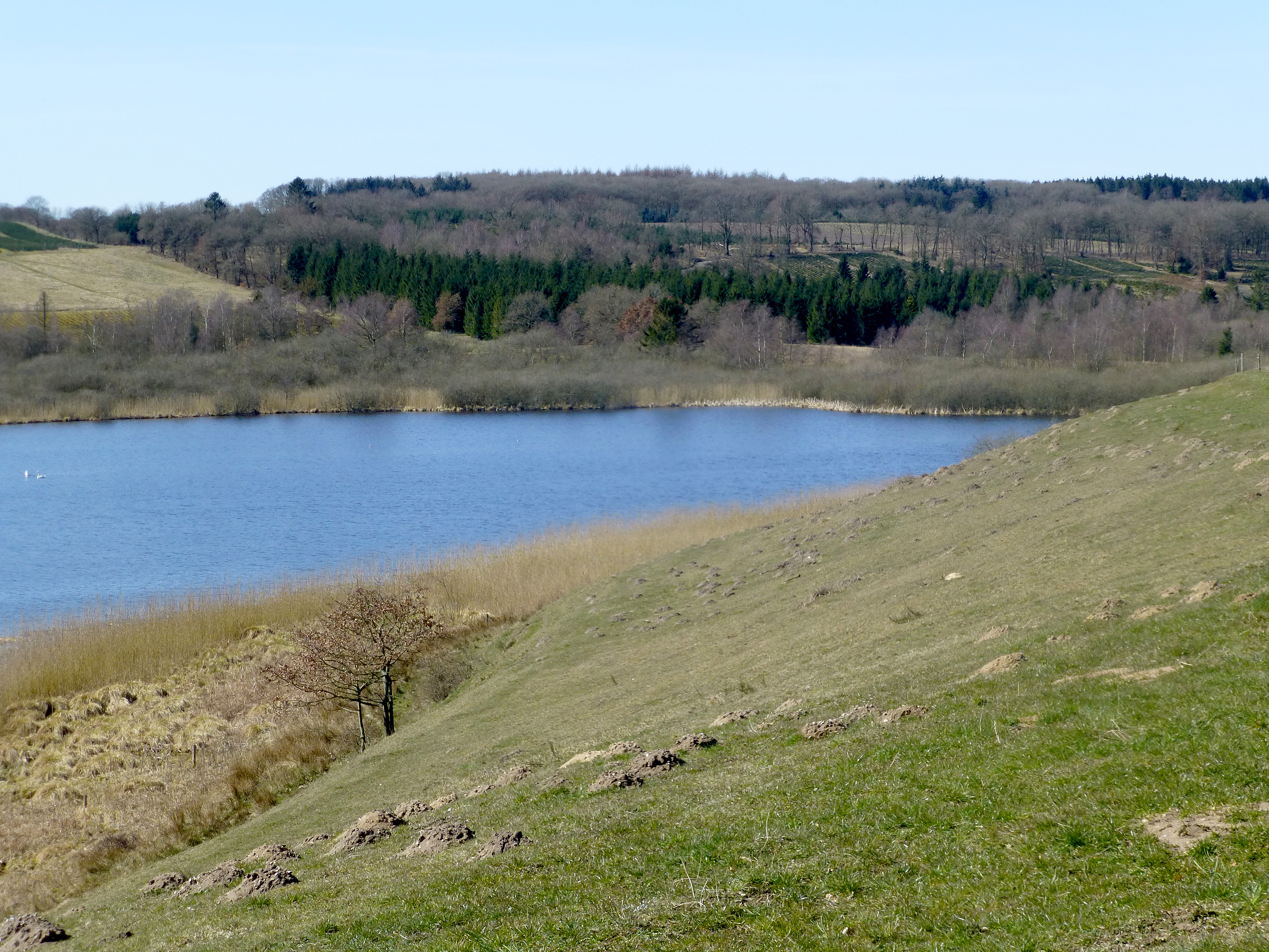 Stigsholm Sø set mod vest